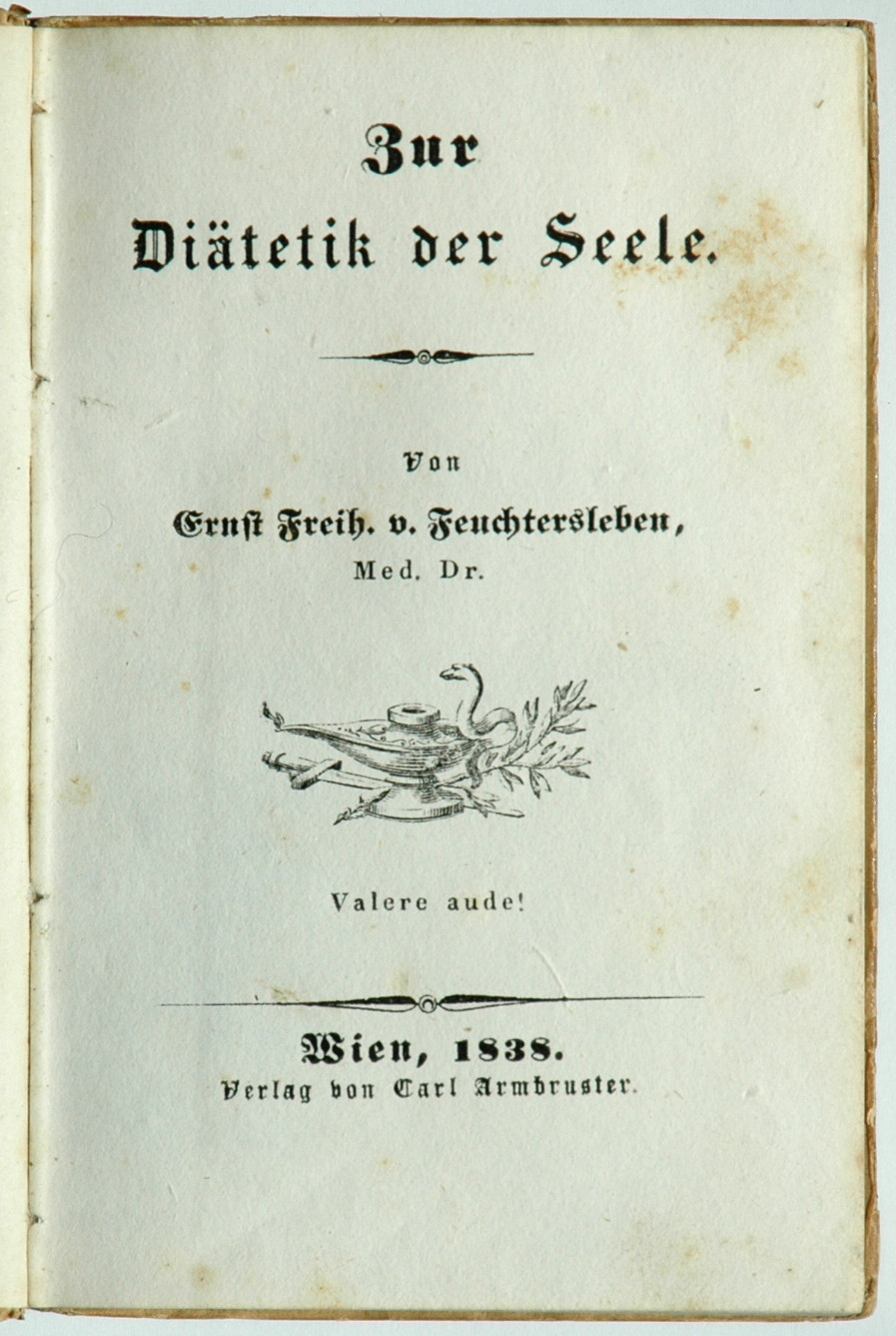 Ernst Freiherr von Feuchtersleben: Zur Diätetik der Seele, Wien: C. Armbruster 1838. Titelblatt der Erstausgabe 14,6 x 9,5cm